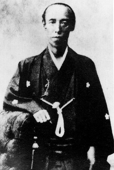 松平勝成の肖像写真。